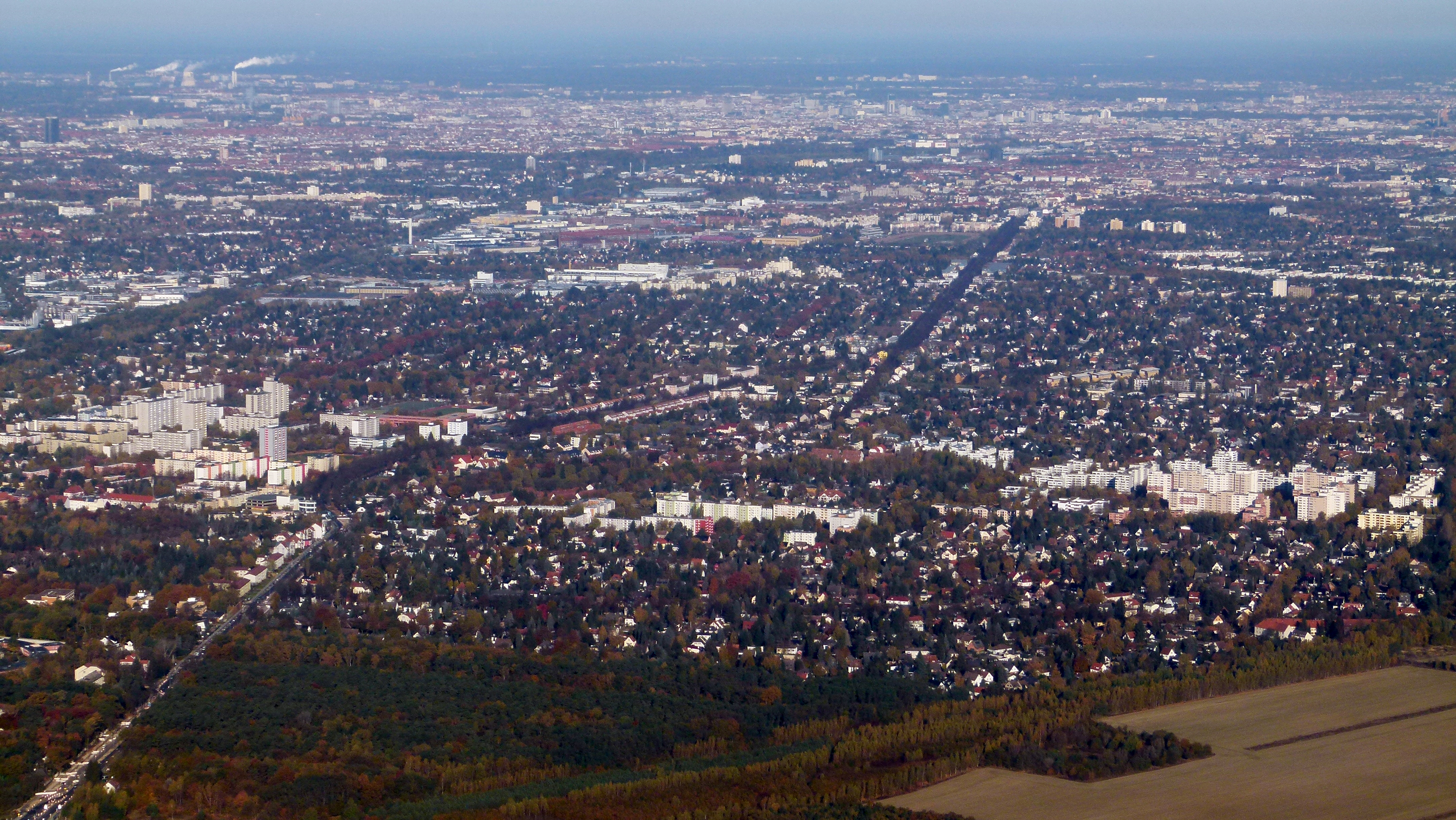 Luftbild von Berlin-Lichtenrade